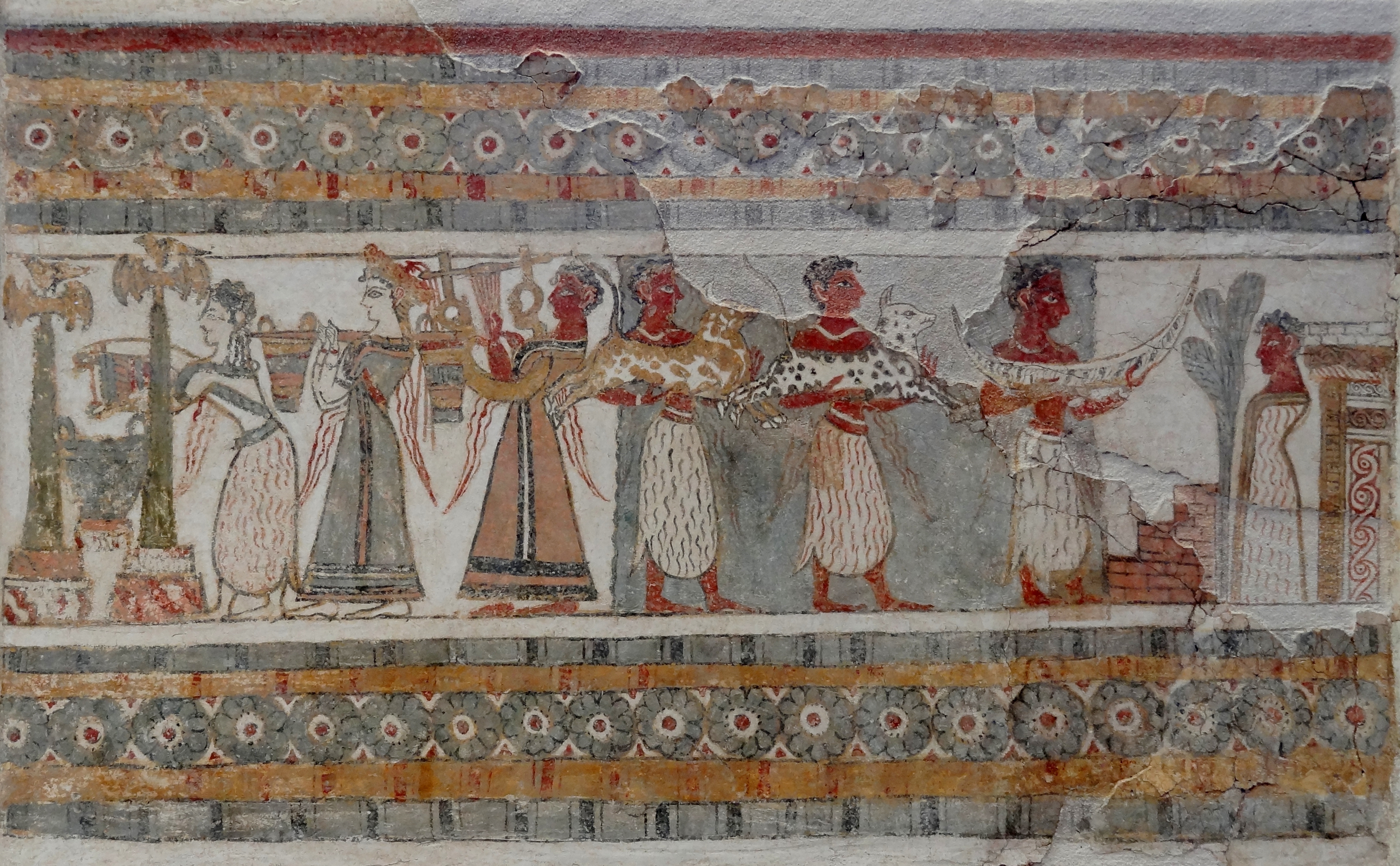 Sarkophag von Agia Triada (14. Jahrhundert v. Chr.), ausgestellt im Archäologischen Museum Iraklio, Kreta, Griechenland